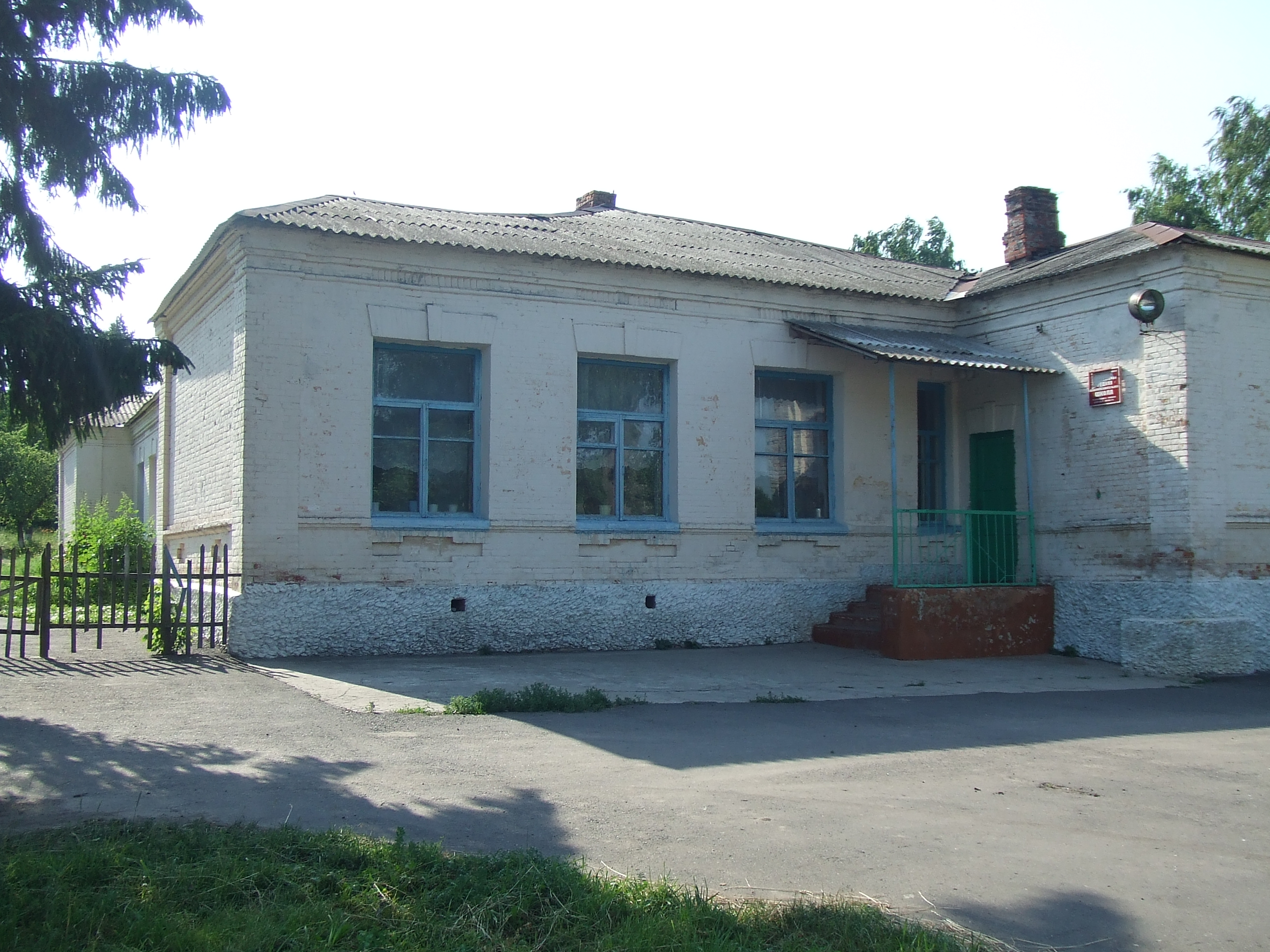 Нижнереутская средняя общеобразовательная школа